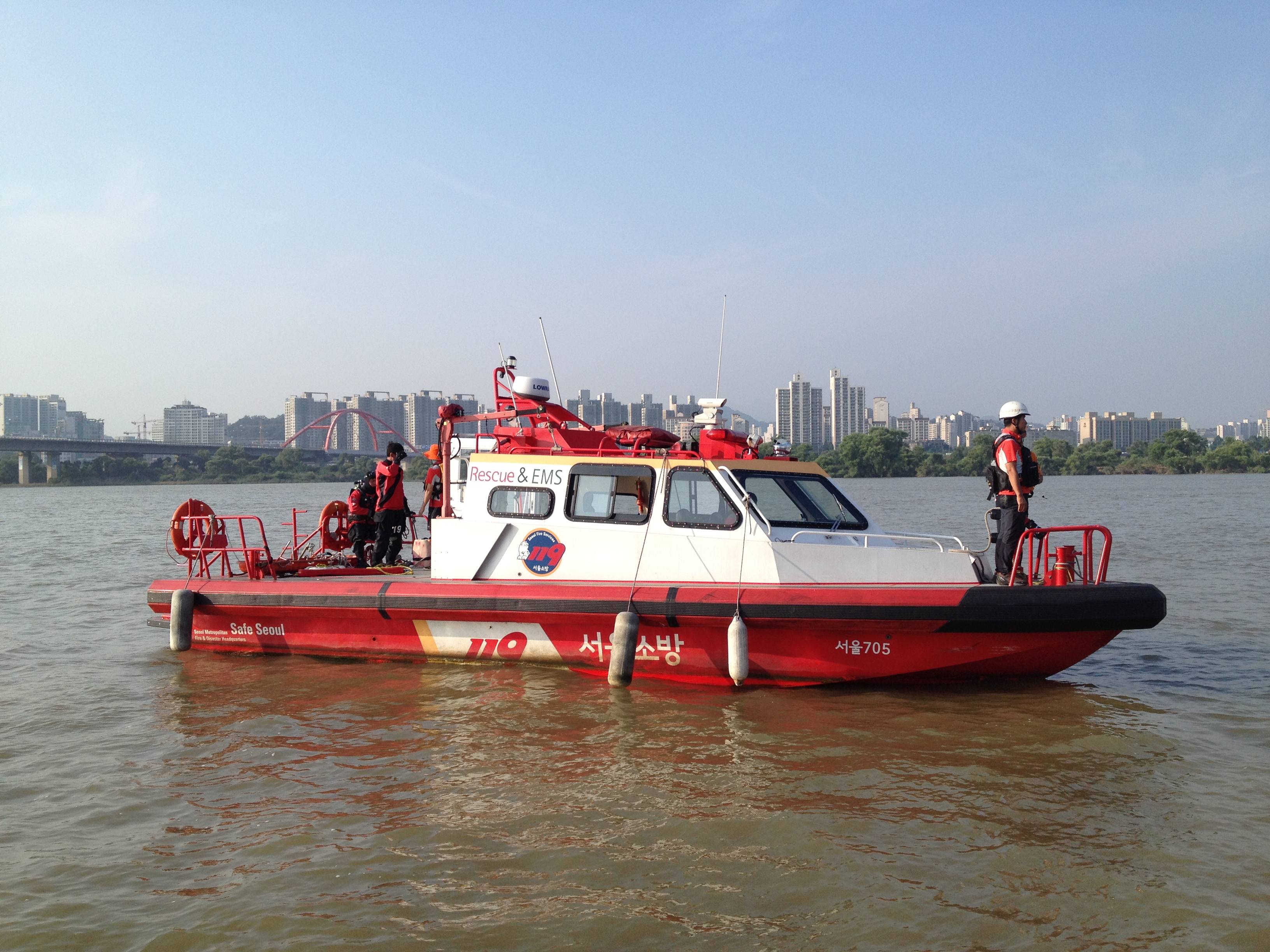 2013년 7월 26일 성재기 남성연대 대표 한강 투신사건 구조활동